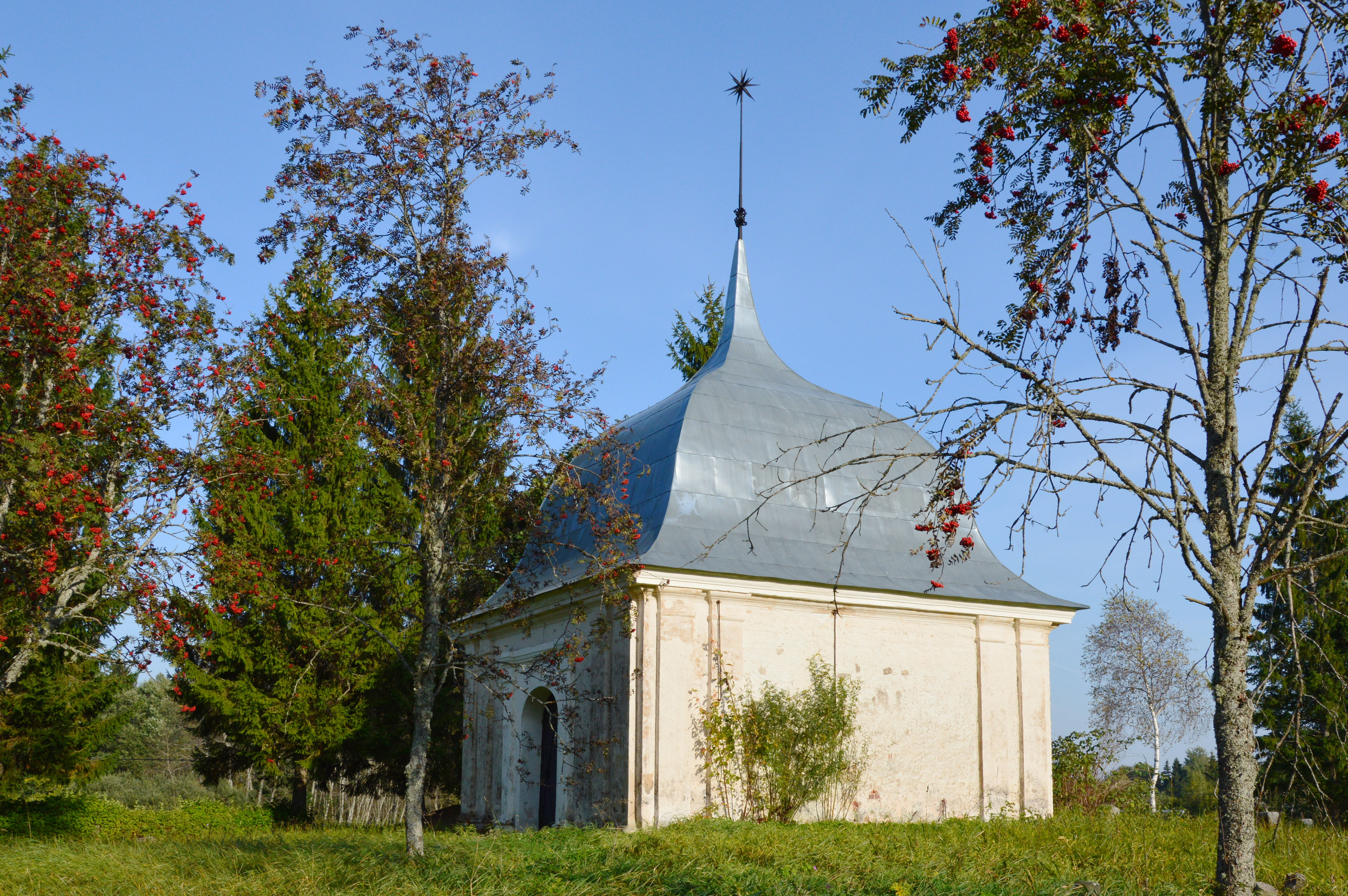 Vastseliina mõisa kabel